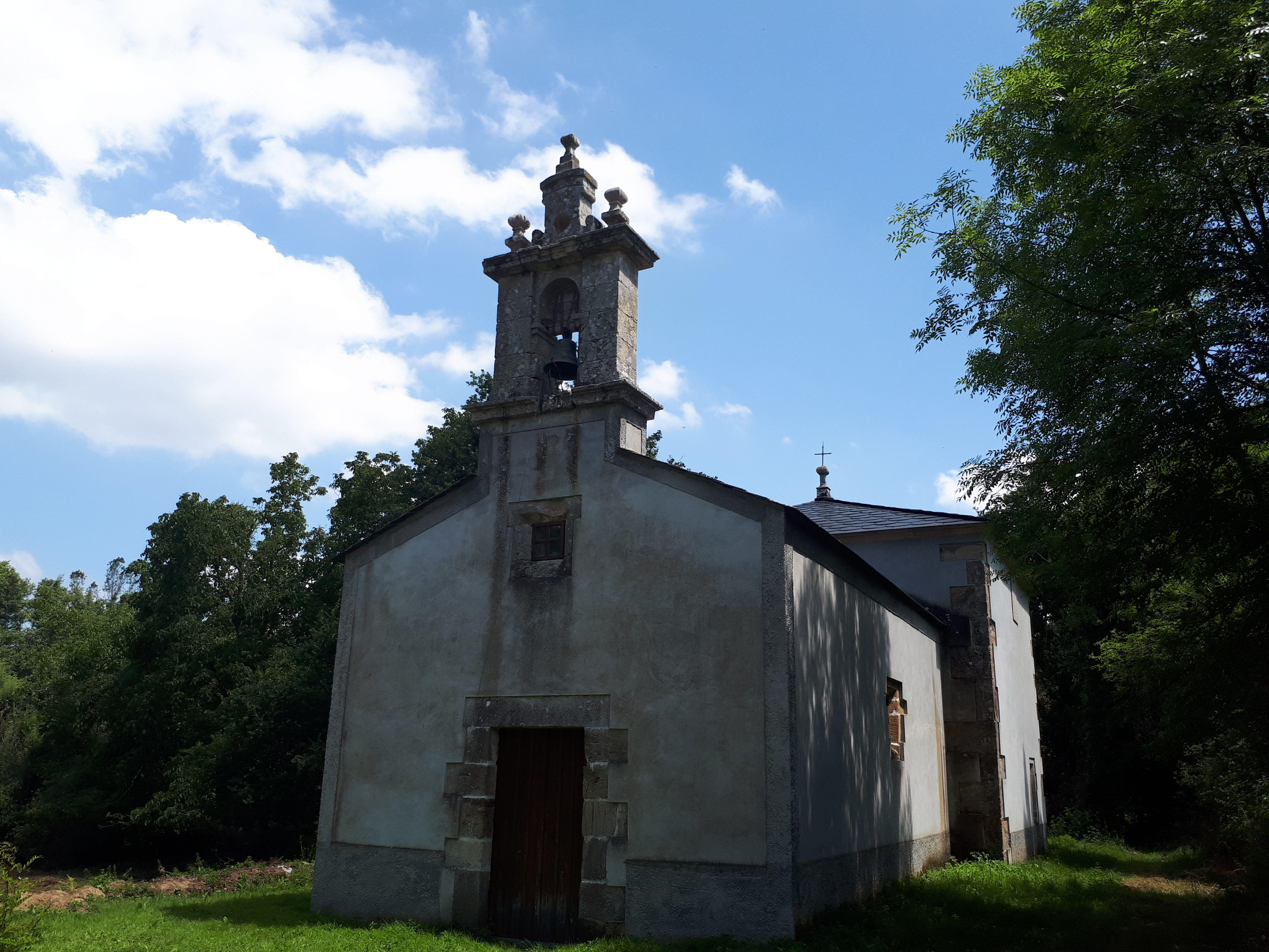 Igrexa de Santiago de Aranza